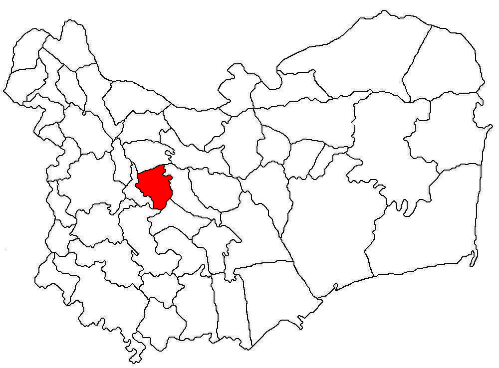 Categorie:Hărţi ale judeţului Tulcea